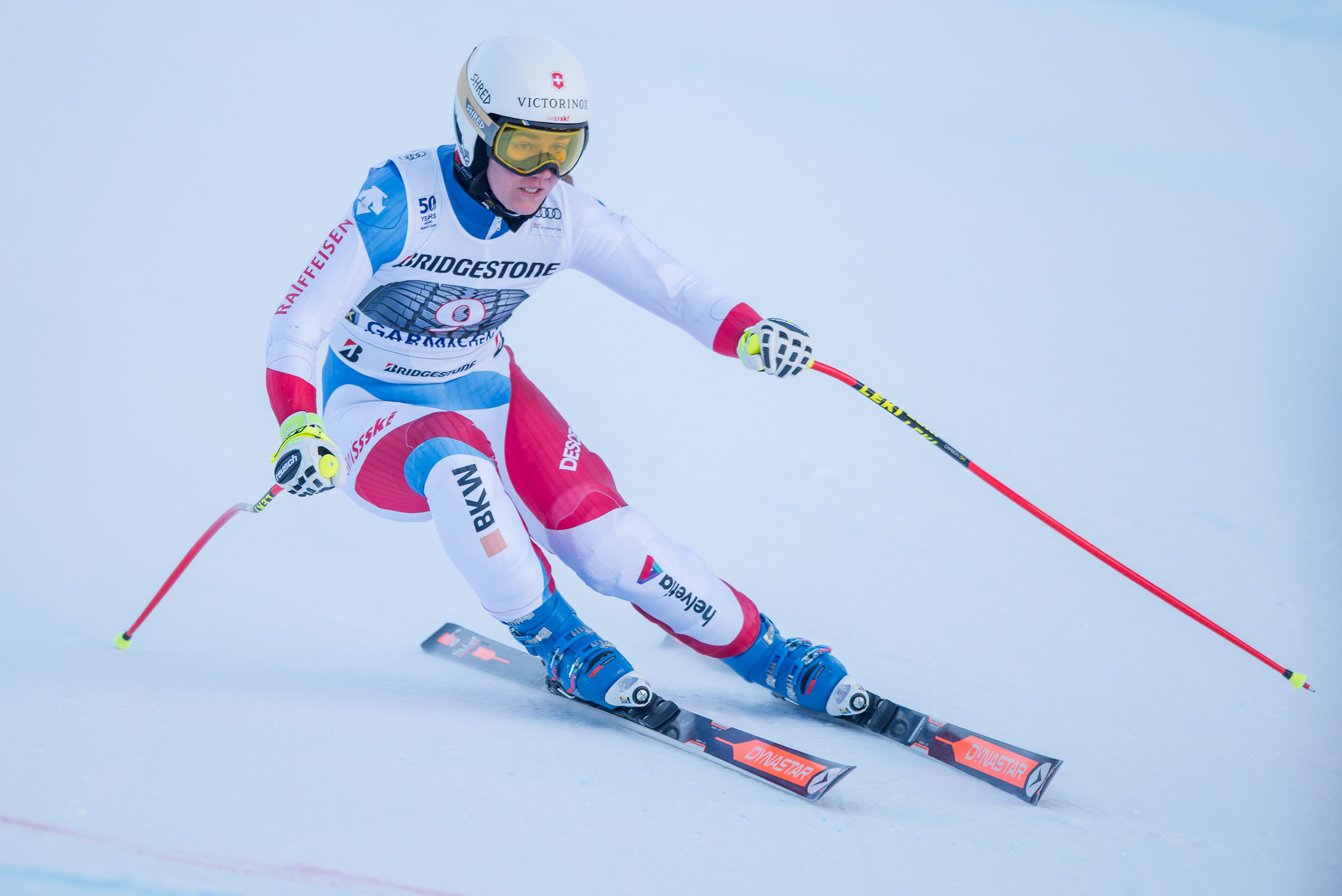 64. Kandahar Rennen,Audi FIS Ski Weltcup Garmisch-Partenkirchen,Damen Abfahrt,Fabienne Suter,Kandahar,Ladies Downhill